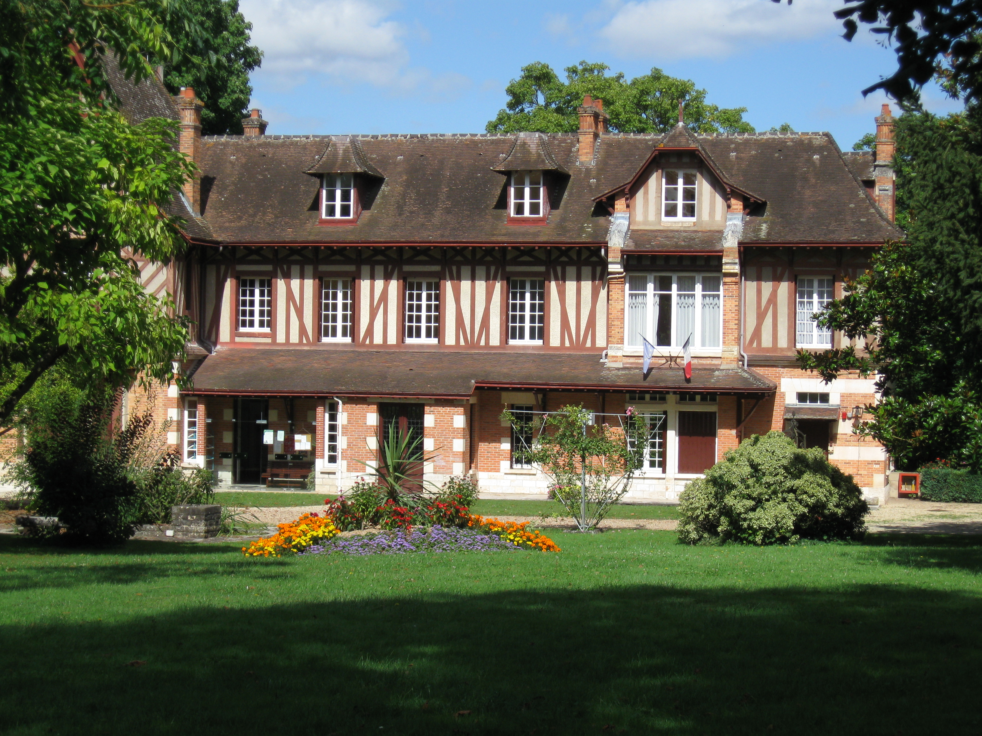 La mairie de Saint-Hilaire-Saint-Mesmin, Loiret, France